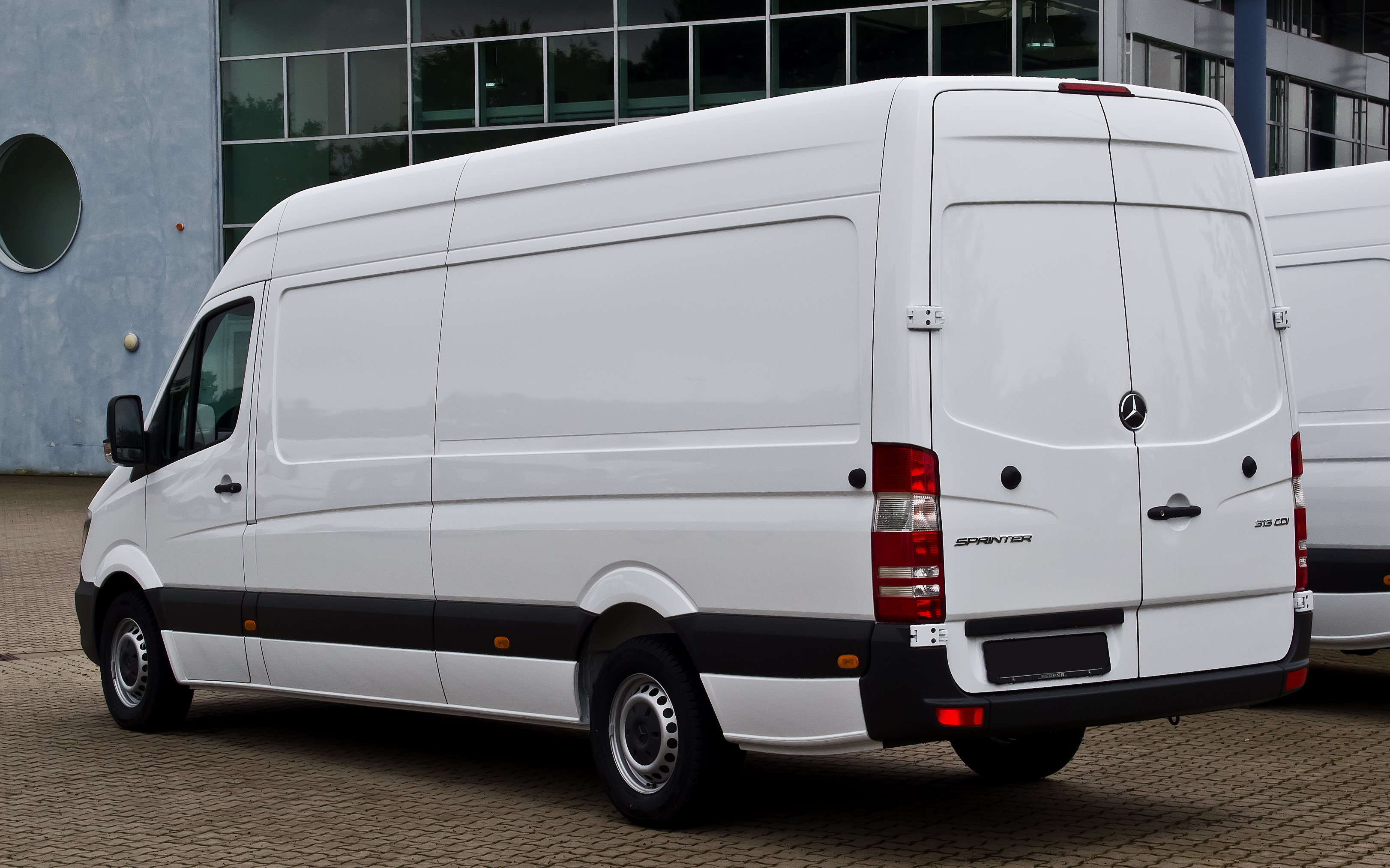 Mercedes-Benz Sprinter Kastenwagen 313 CDI (W 906, Facelift)